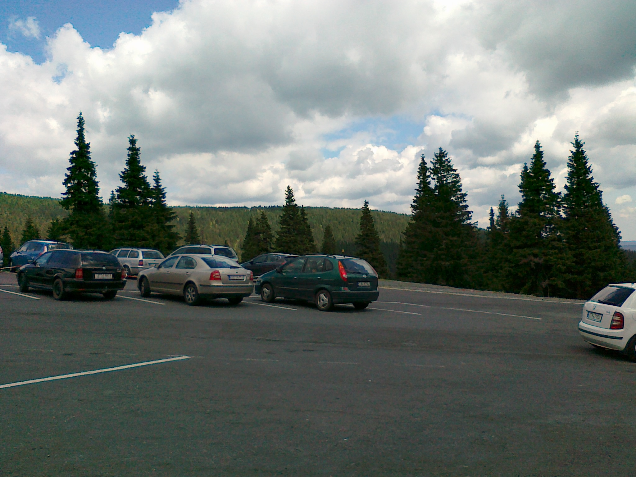 Widok na drugorzędny szczyt góry Pradziad, Praděd-V - 1355 m n.p.m.